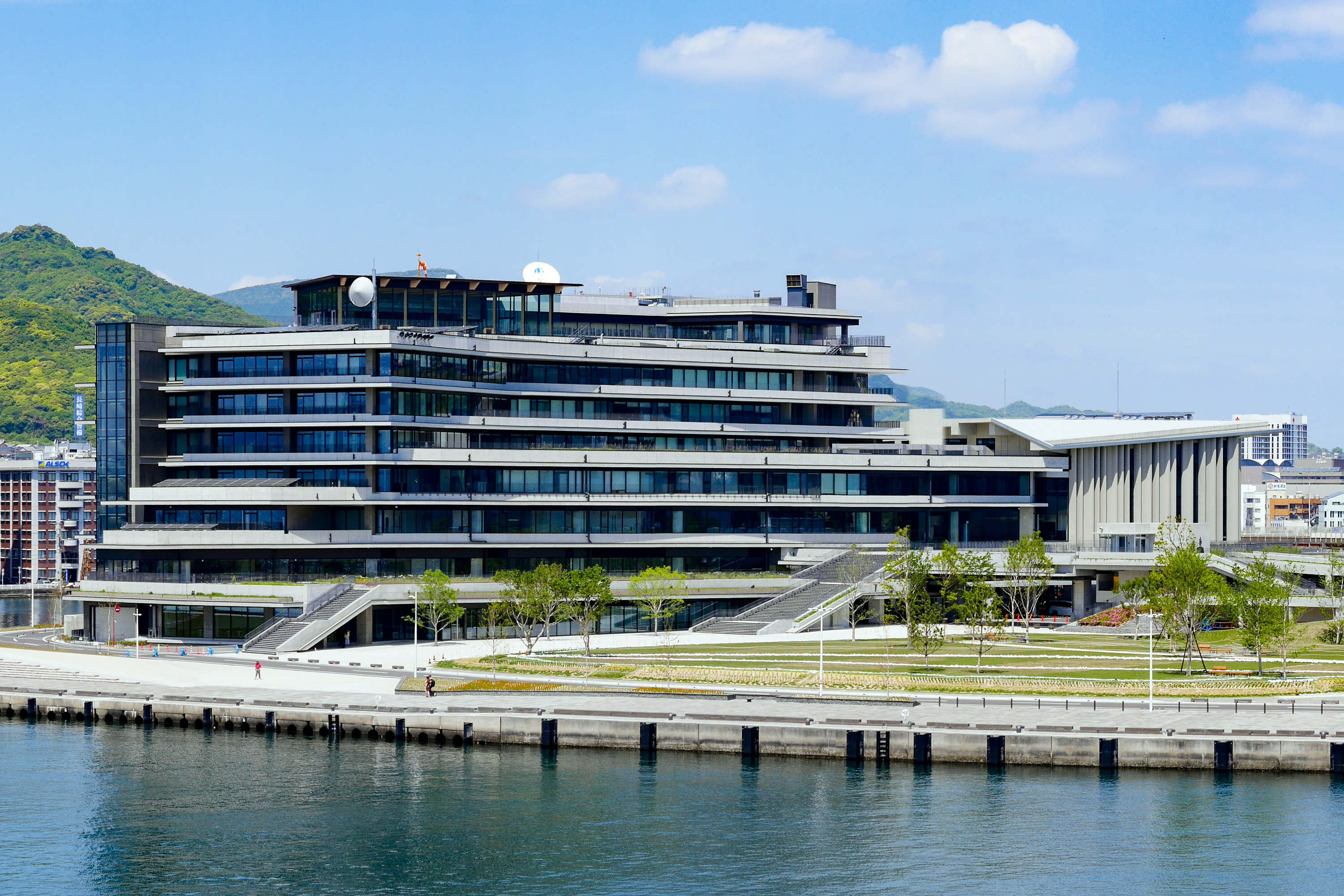 2017年に完成した長崎県庁舎、通称行政棟（長崎県長崎市）